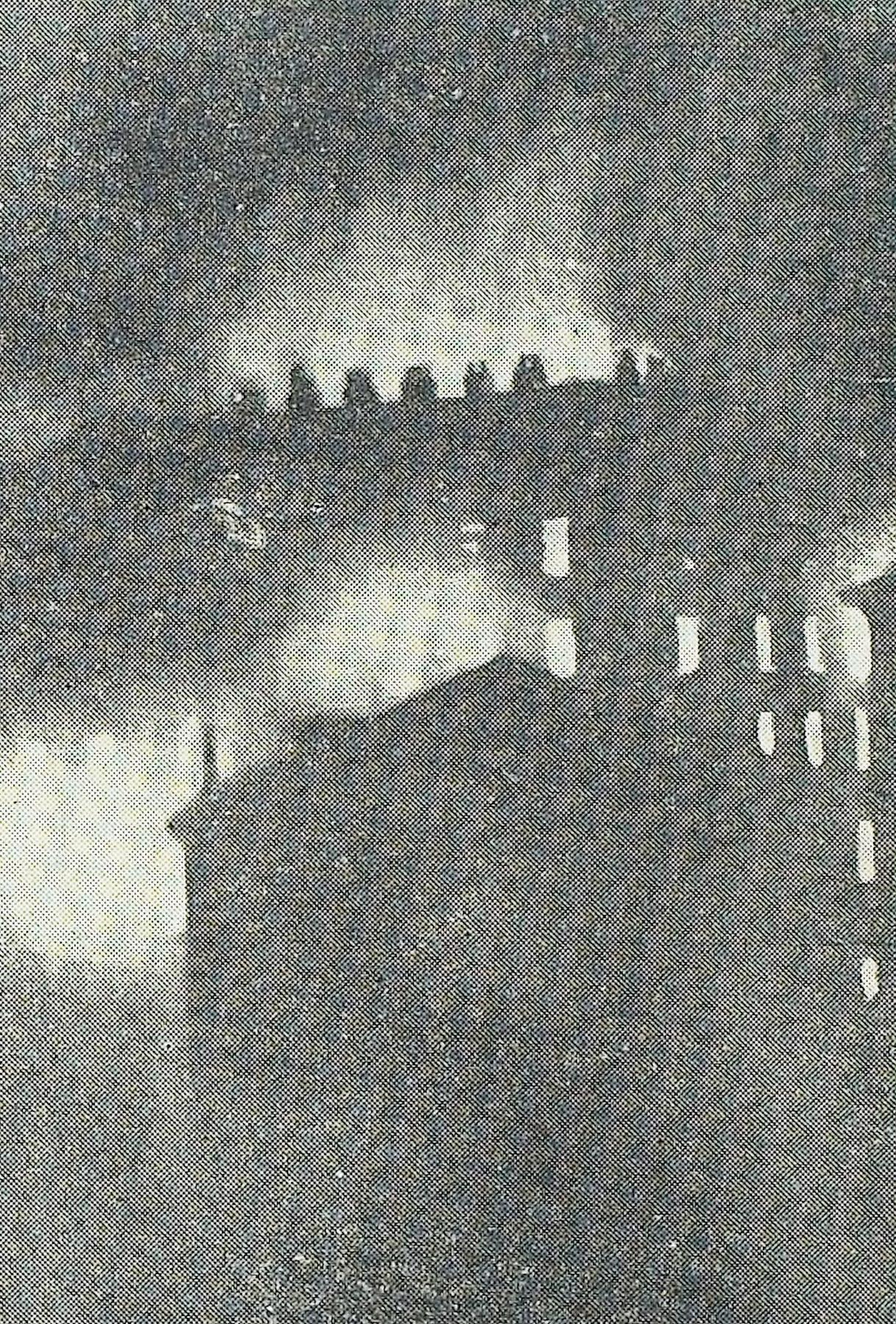 Goreči Narodni dom v Trstu.